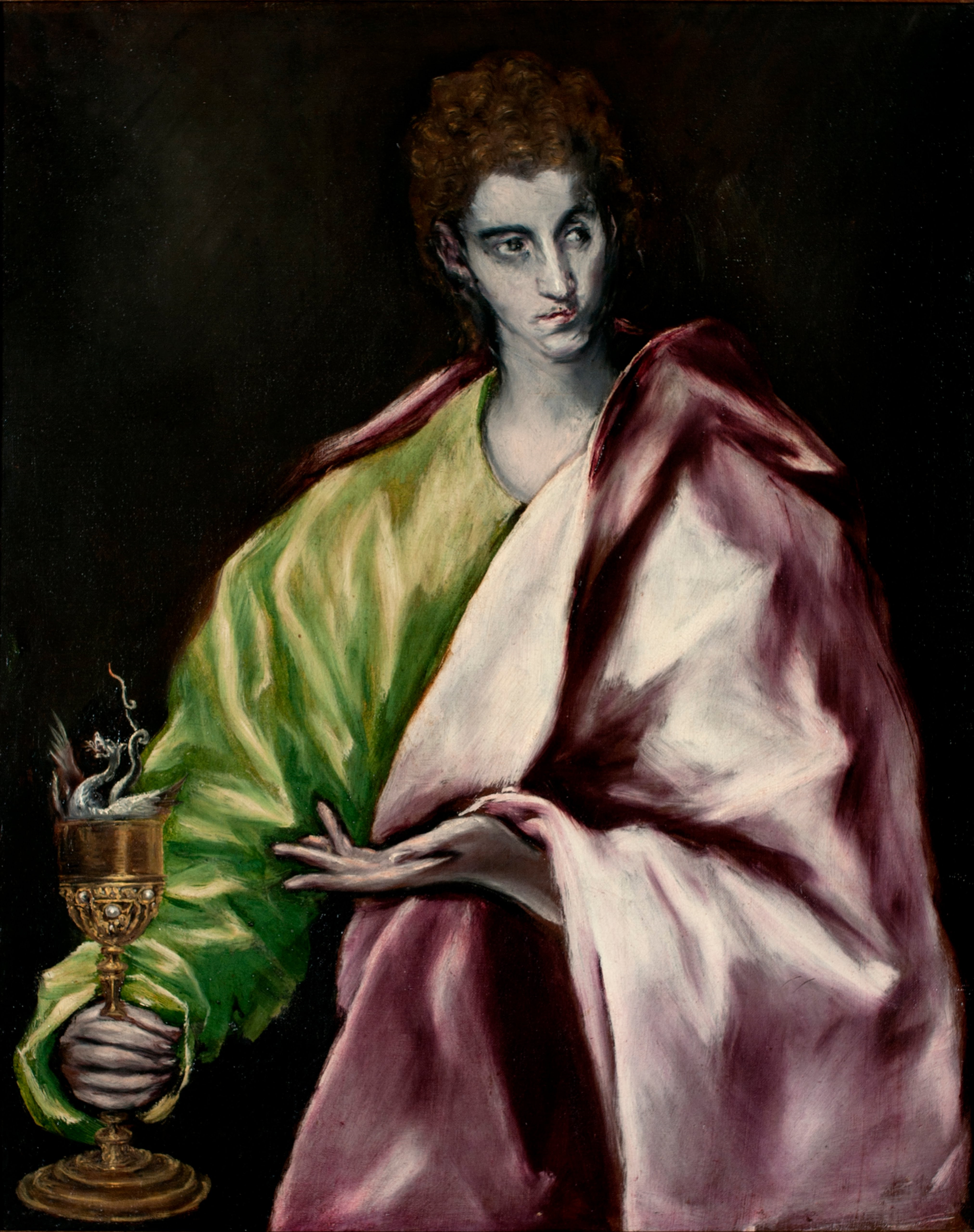 La obra representa a San Juan Evangelista, uno de los doce apóstoles de Jesucristo y también uno de los cuatro evangelistas.